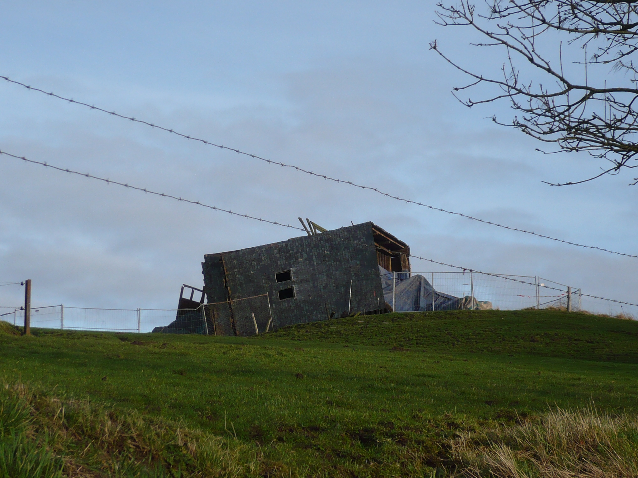 Moulin de thimougies tombé aprés une tempête